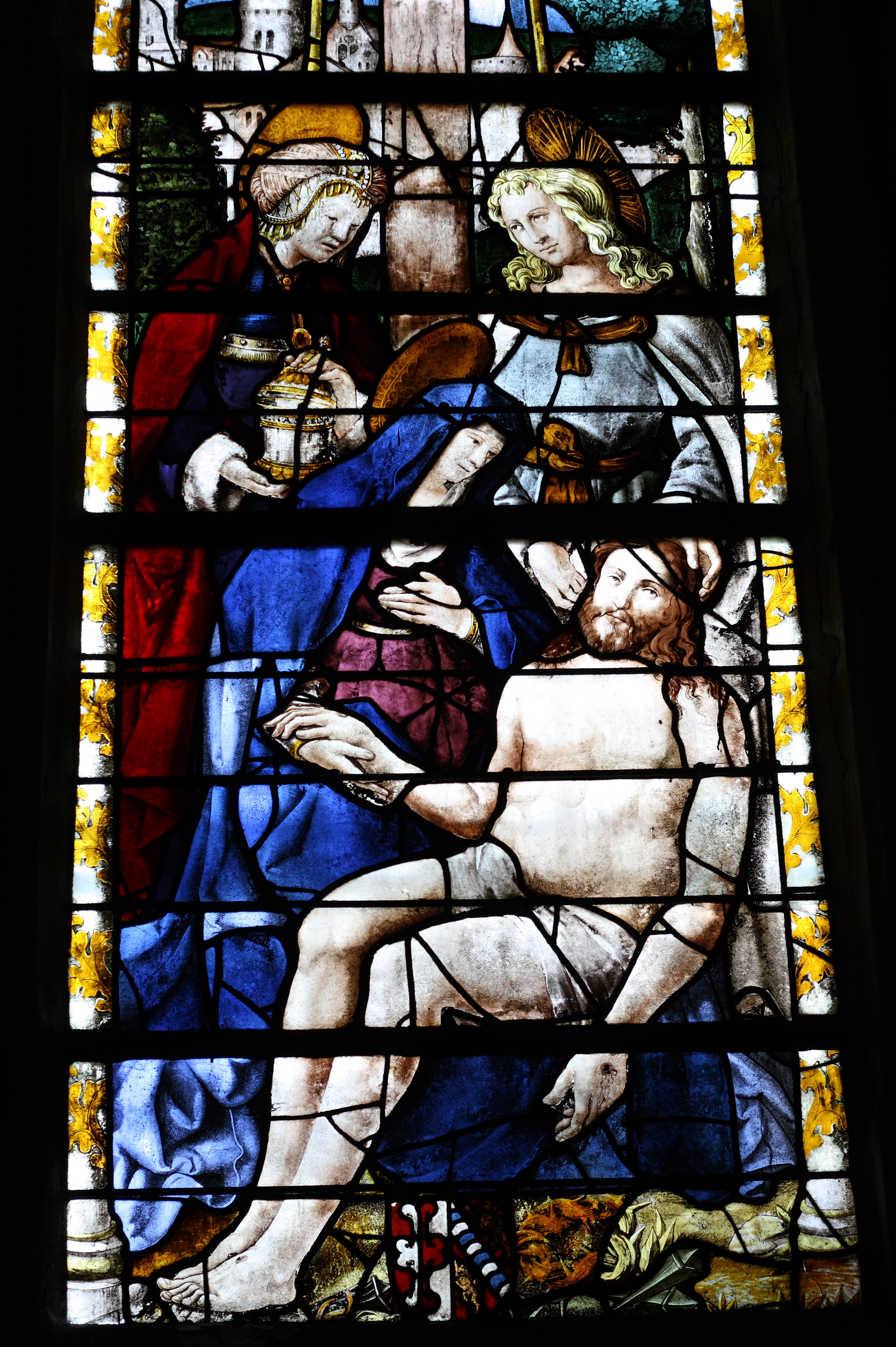 Katholische Pfarrkirche Saint-Martin in Herblay, einer Gemeinde im Département Val d'Oise (Île de France), Bleiglasfenster aus dem 16. Jh., Darstellung: Pietà (Ausschnitt), Signatur (am Parfümflacon): Chastellain